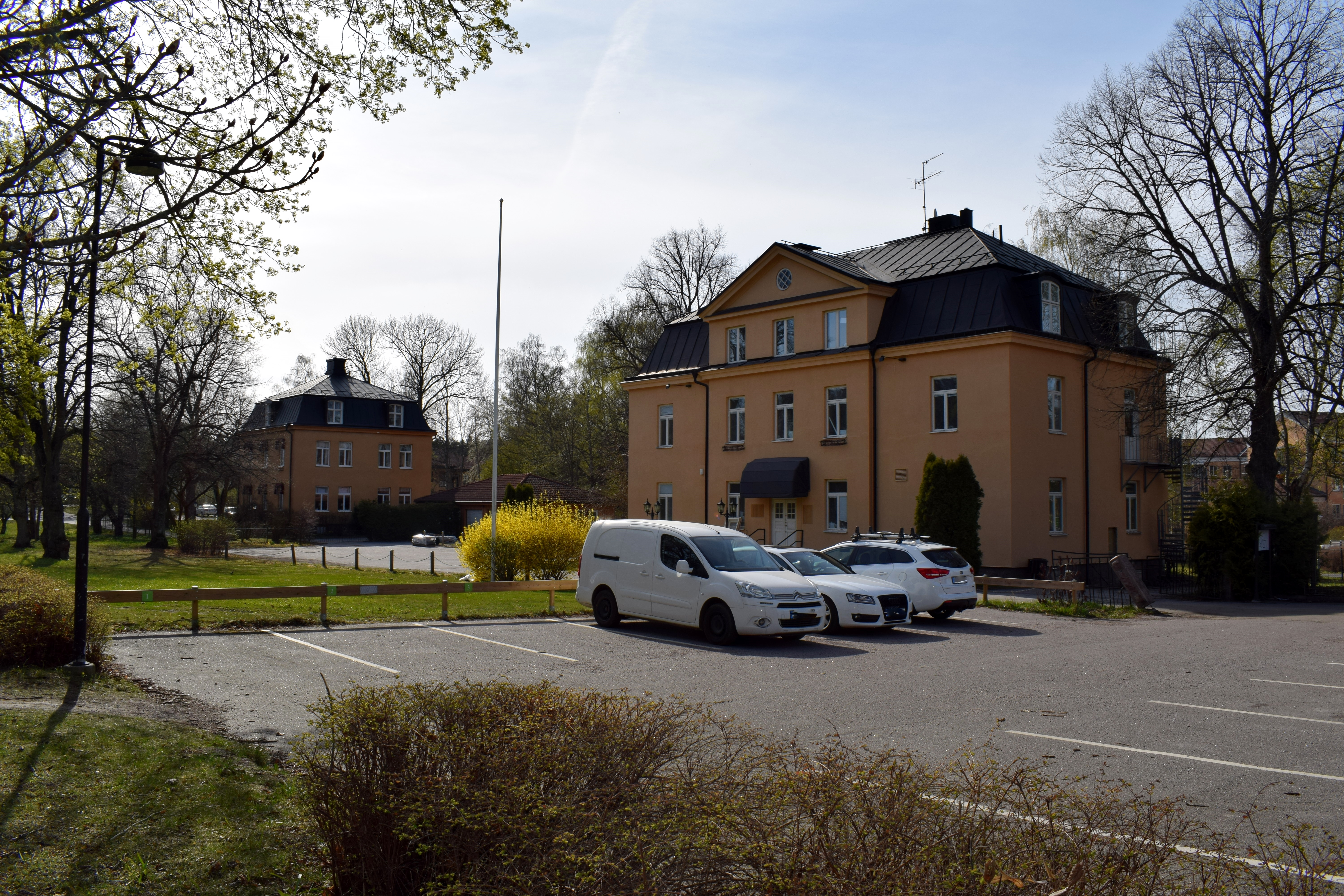 Före detta underofficersmäss på Djurgårdsgatan 56-58 i Linköping.